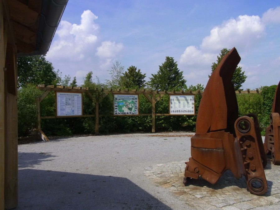 Teil des Heimatparks Weißagk, der zur Erinnerung an das abgebaggerte Dorf errichtet wurde.